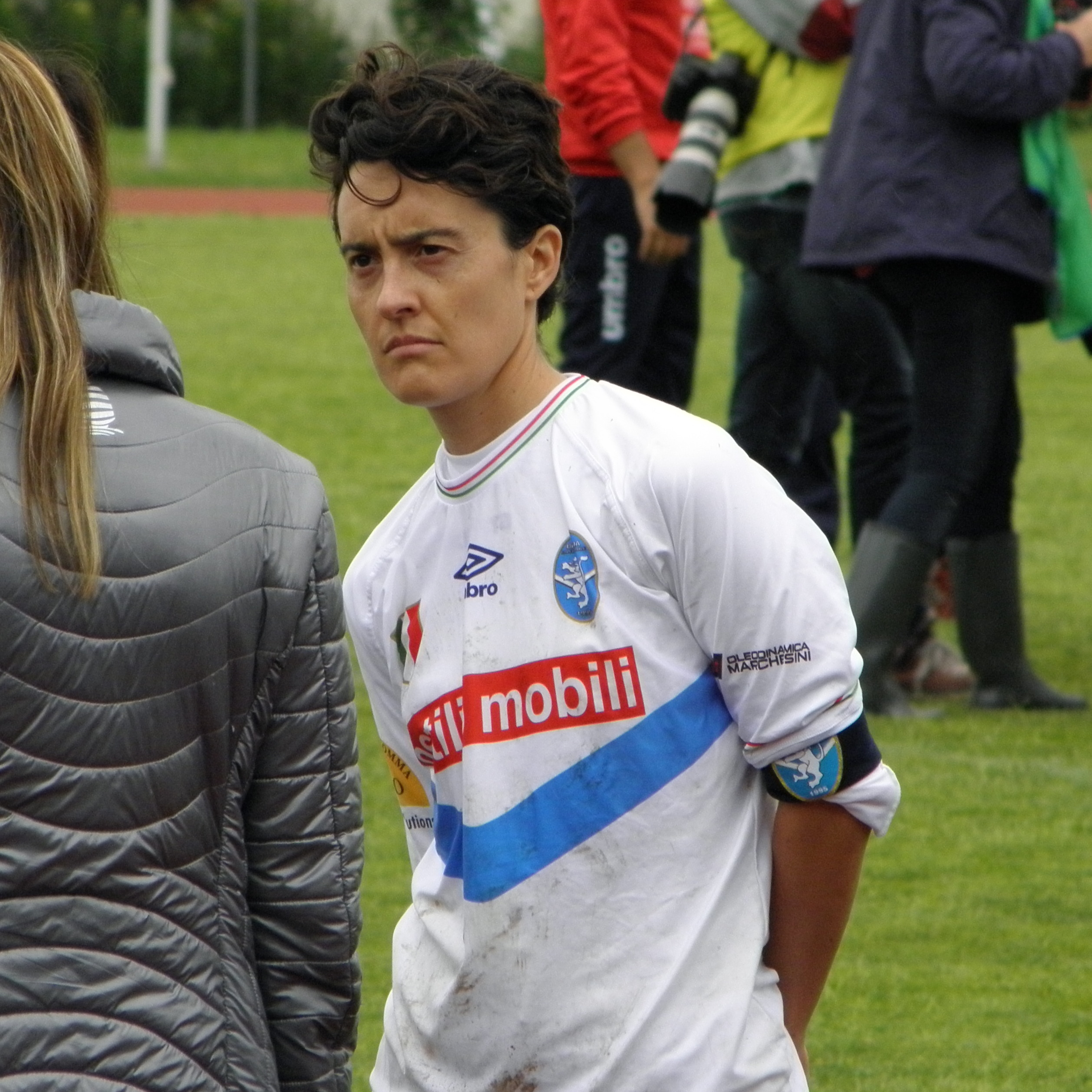 Abano Terme, 23 maggio 2015, finale di Coppa Italia di calcio femminile 2014-2015: Elisa Zizioli, difensore e capitano del Brescia, durante la cerimonia di premiazione a fine partita.